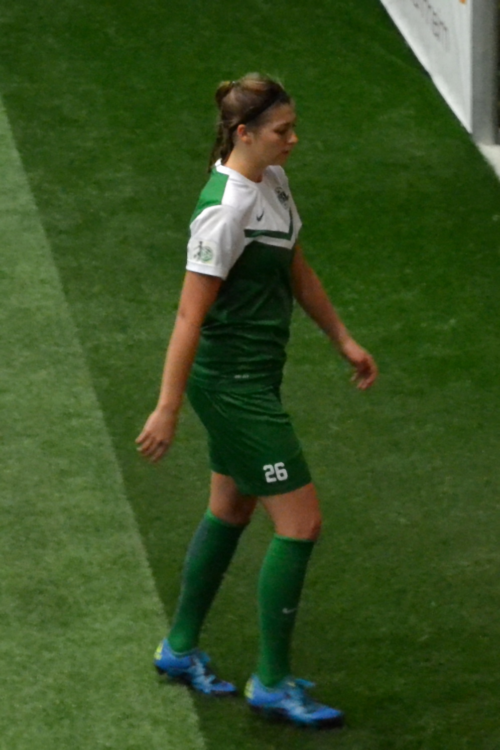 Lena Pauels (SGS Essen) beim SAP Frauen-FußballCup 2016